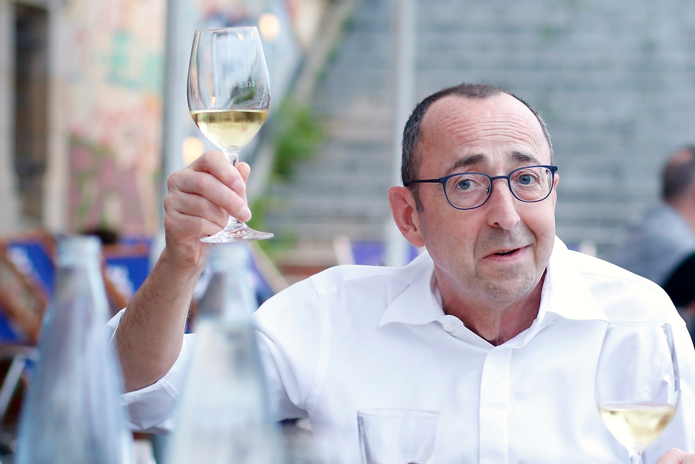 Salute!